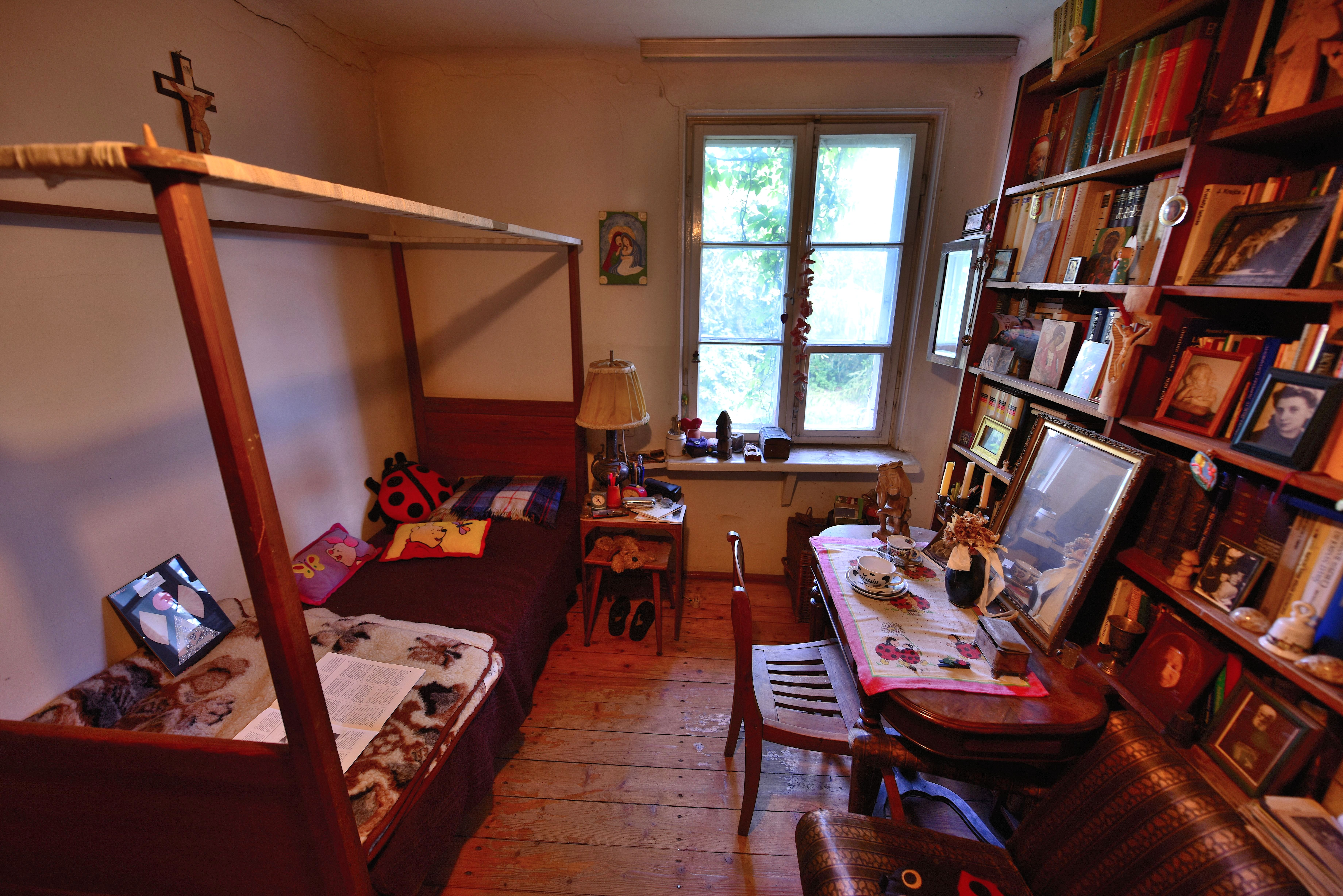 Mieszkanie ks Jana Twardowskiego przy klasztorze sióstr wizytek w Warszawie